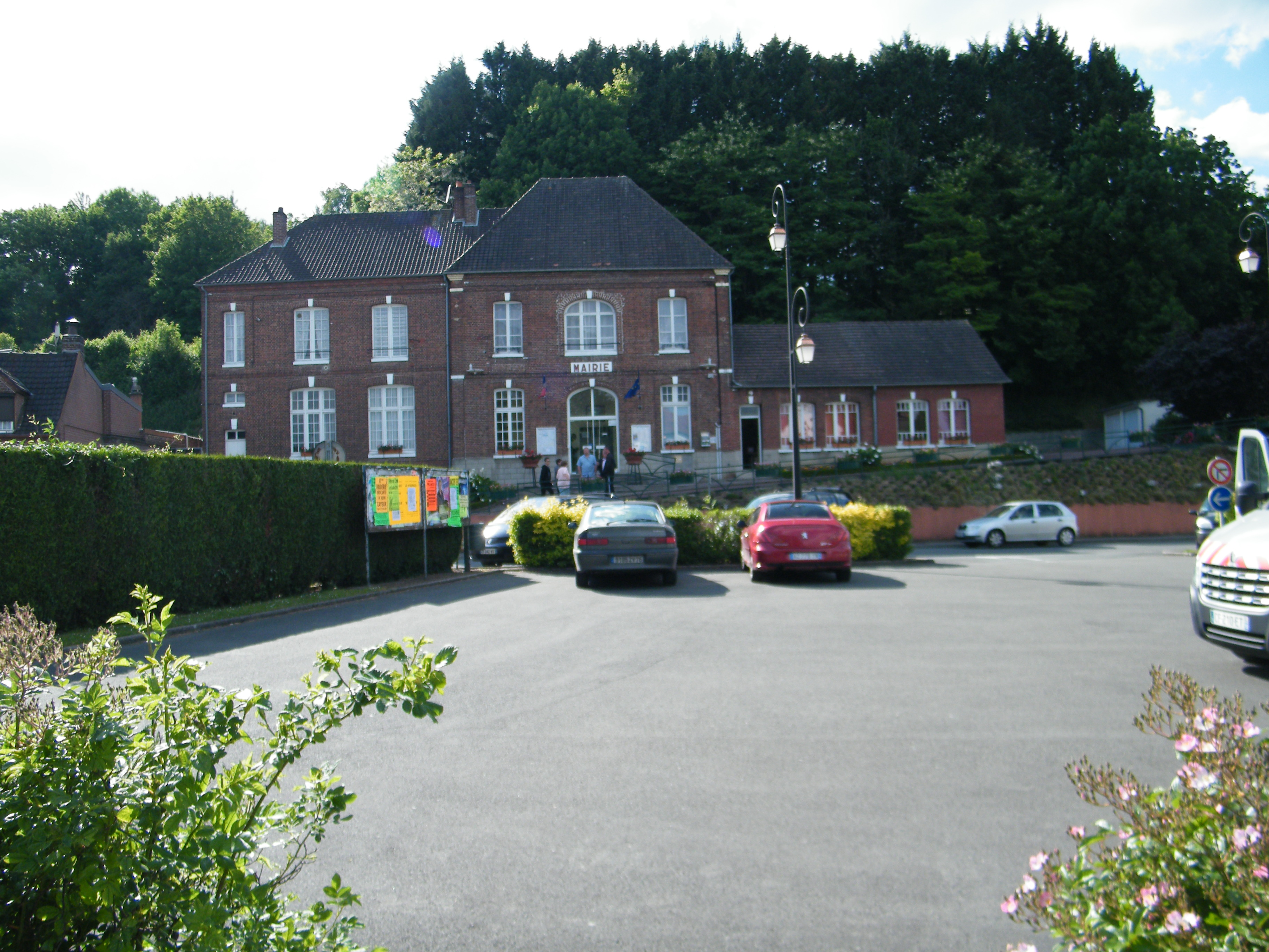 Mairie.